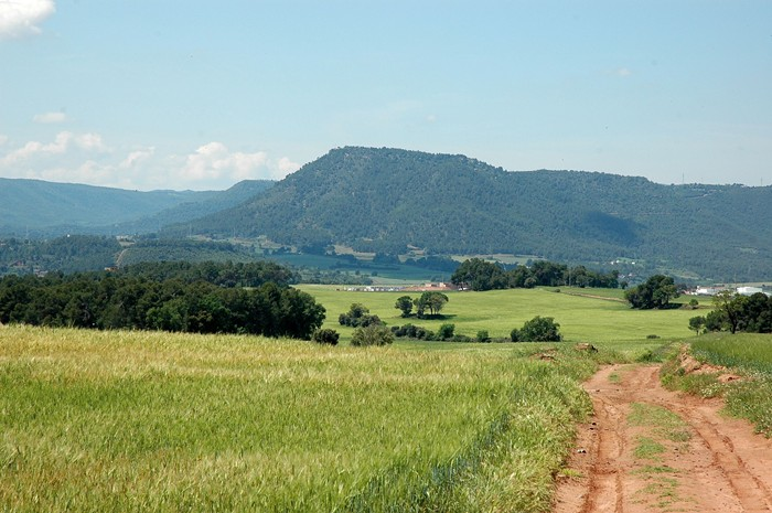 Collbaix des de Santpedor